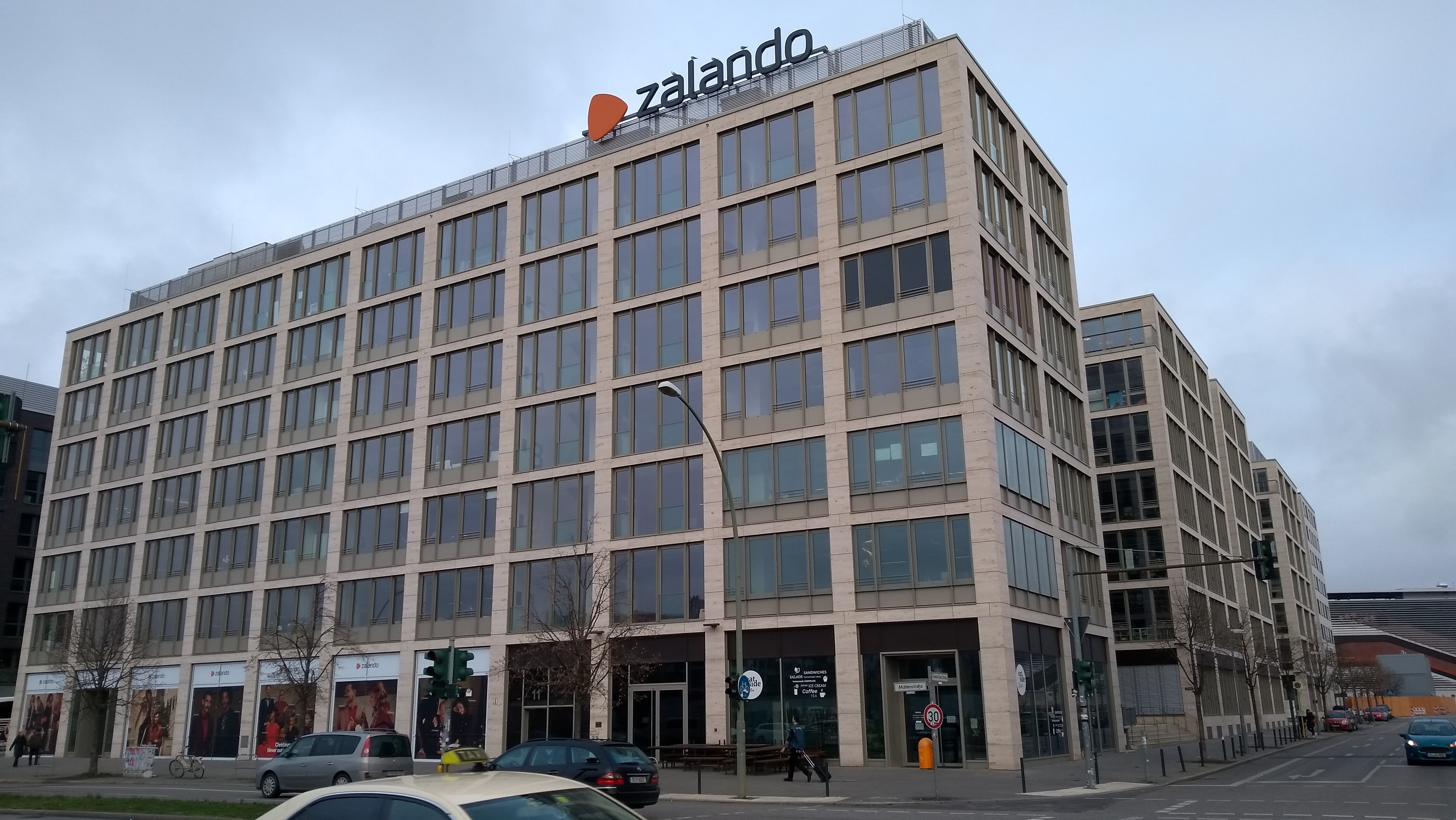 Gebäude der Hauptverwaltung von Zalando in Berlin